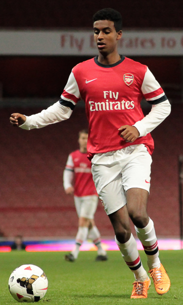 Gedion Zelalem